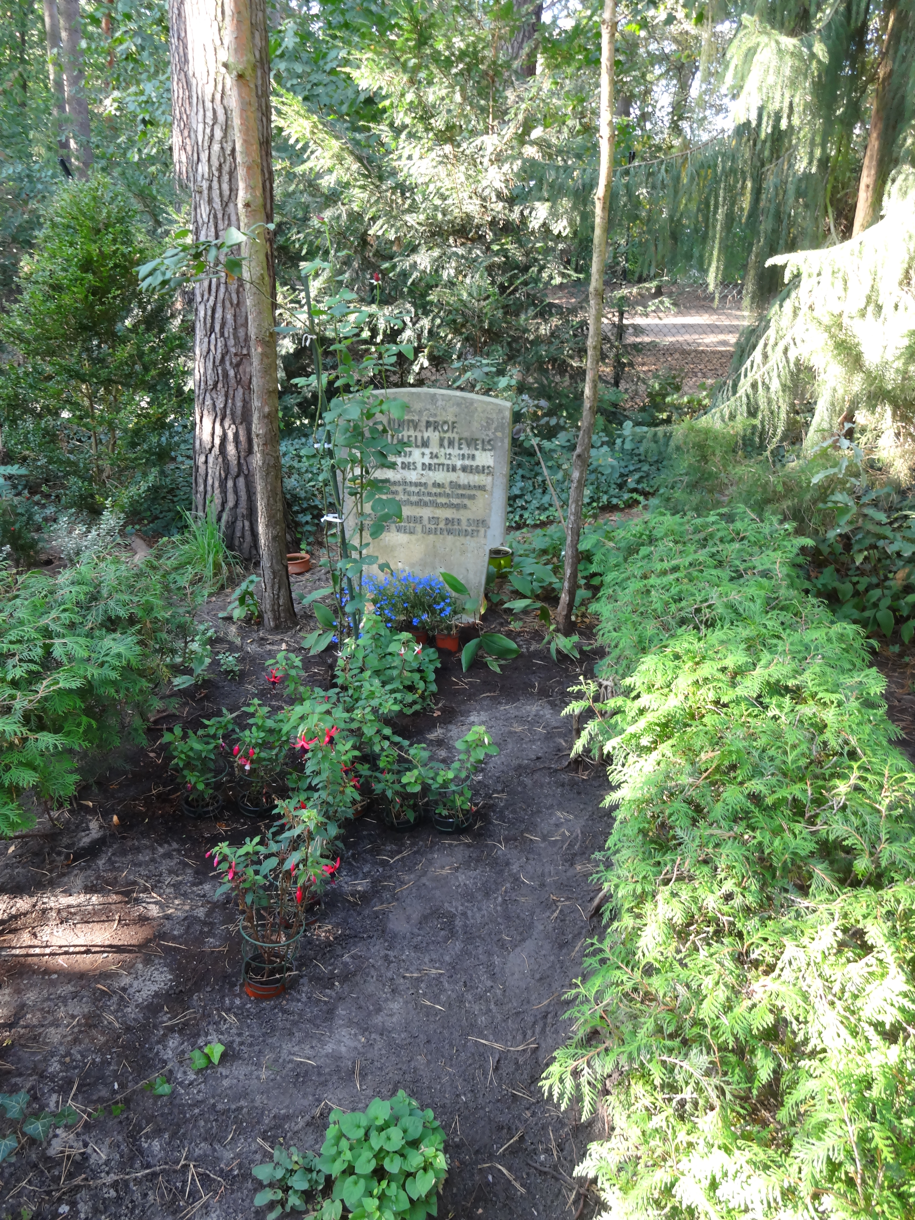 Grab von Wilhelm Knevels auf dem Waldfriedhof Dahlem